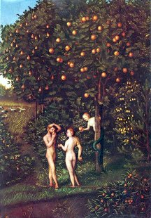 Garten Eden Cranach Sündenfall des Menschen Sündenfall des Menschen von Lukas Cranach